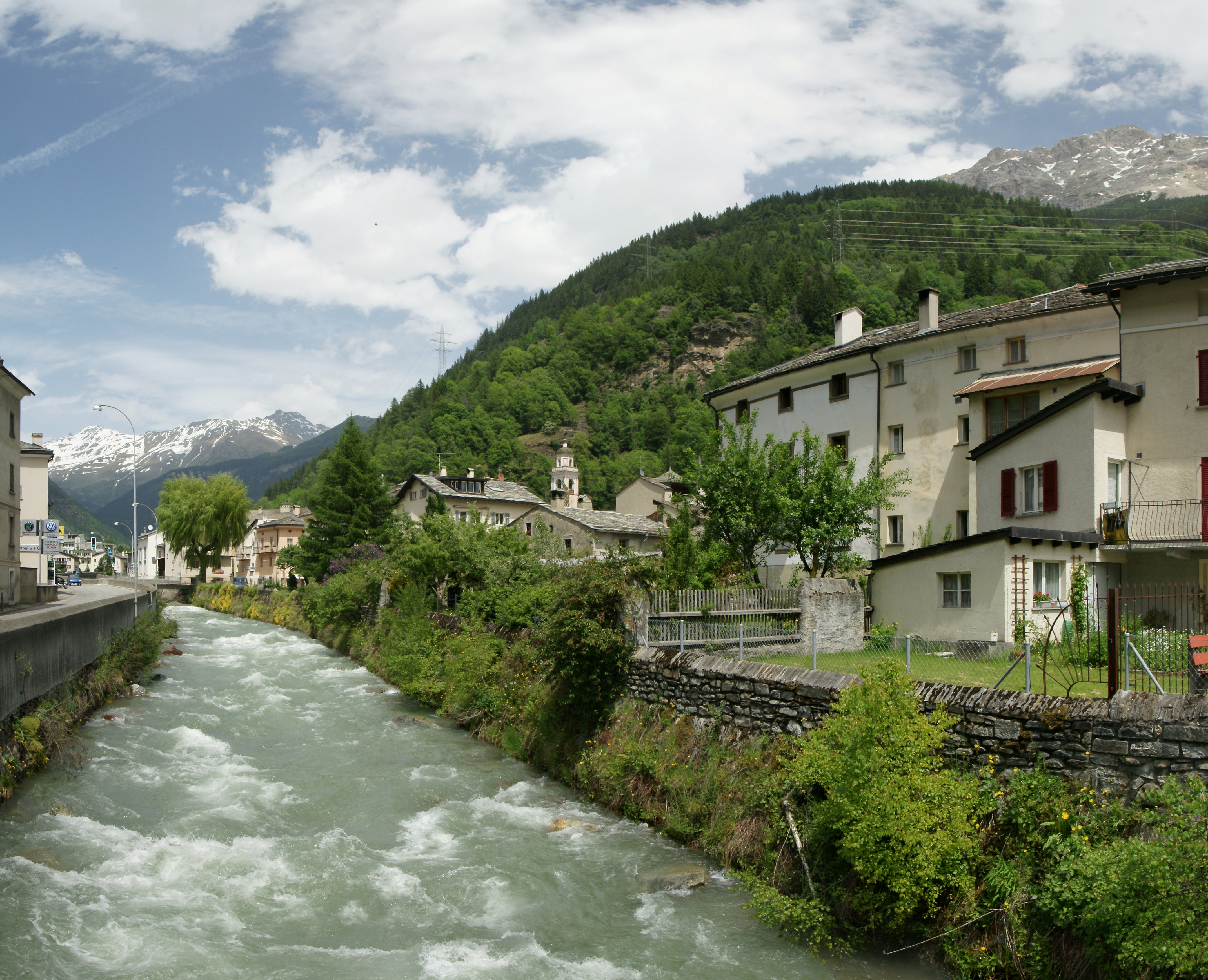 Der Poschiavino fliesst durch Poschiavo (deutsch/rätoromanisch Puschlav) ist eine politische Gemeinde im südlichen Graubünden (Schweiz). Zusammen mit der Nachbargemeinde Brusio bildet Poschiavo die Talschaft Valposchiavo (deutsch: Puschlav) und den Bezirk Bernina.